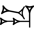 Sumer–akkád írásjel: DU, GIN, GUB, RA2, ŠA4, ri6, alāku, kânu, kīnu